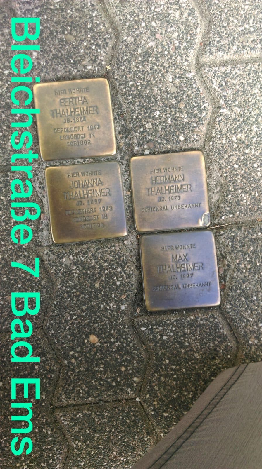 Stolperstein Bleichstraße 7 Bad Ems